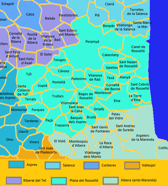 Mapa de la Plana del Rosselló elaborat a partir d'un mapa de lliure distribució